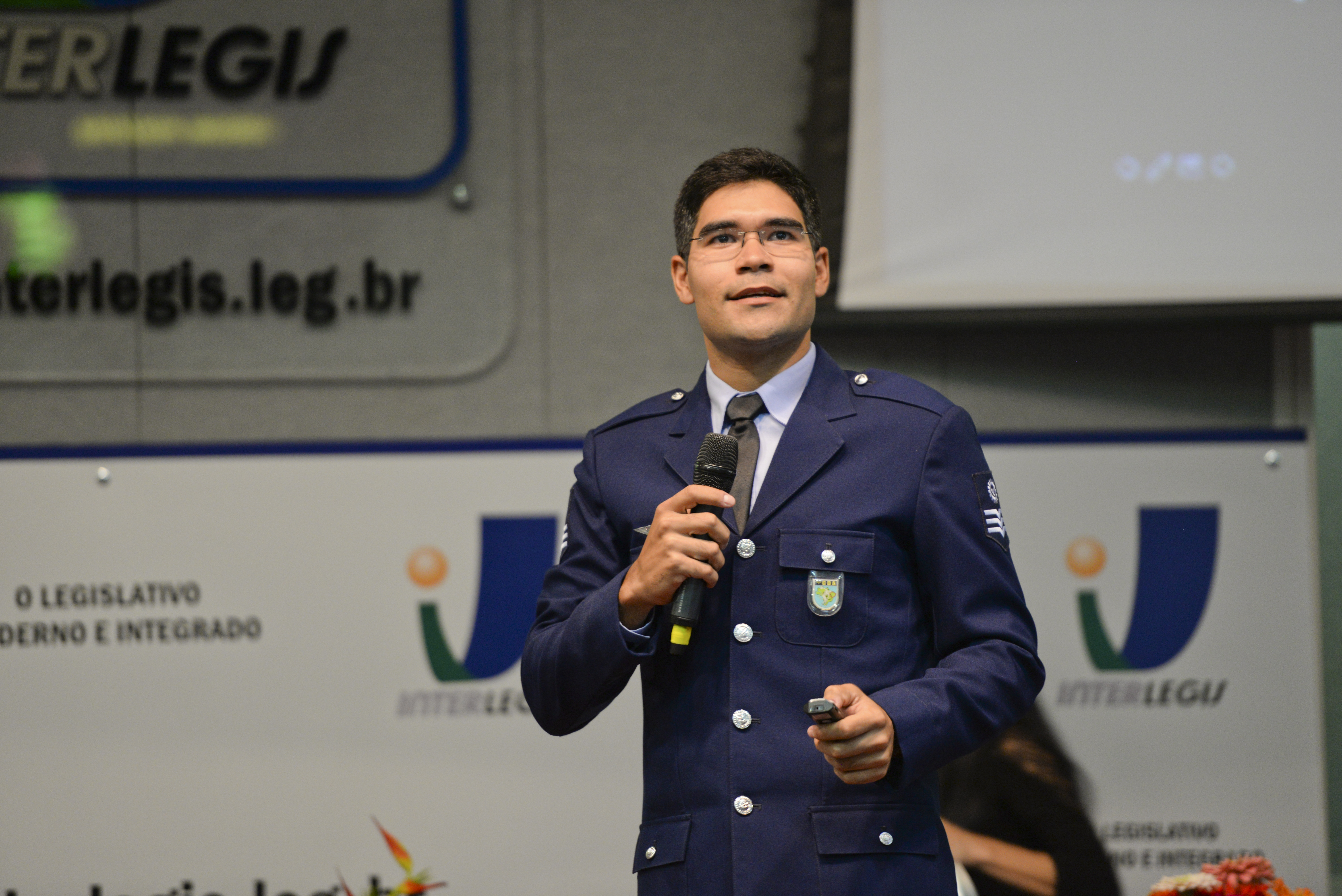 Gurpo Jovem Senador 2016 assiste palestra motivacional com os atletas olímpicos no Interlegis. Em discurso, ciclista de pista e atleta Olímpico, Gideoni Monteiro. Foto: Rodrigo Viana/Senado Federal